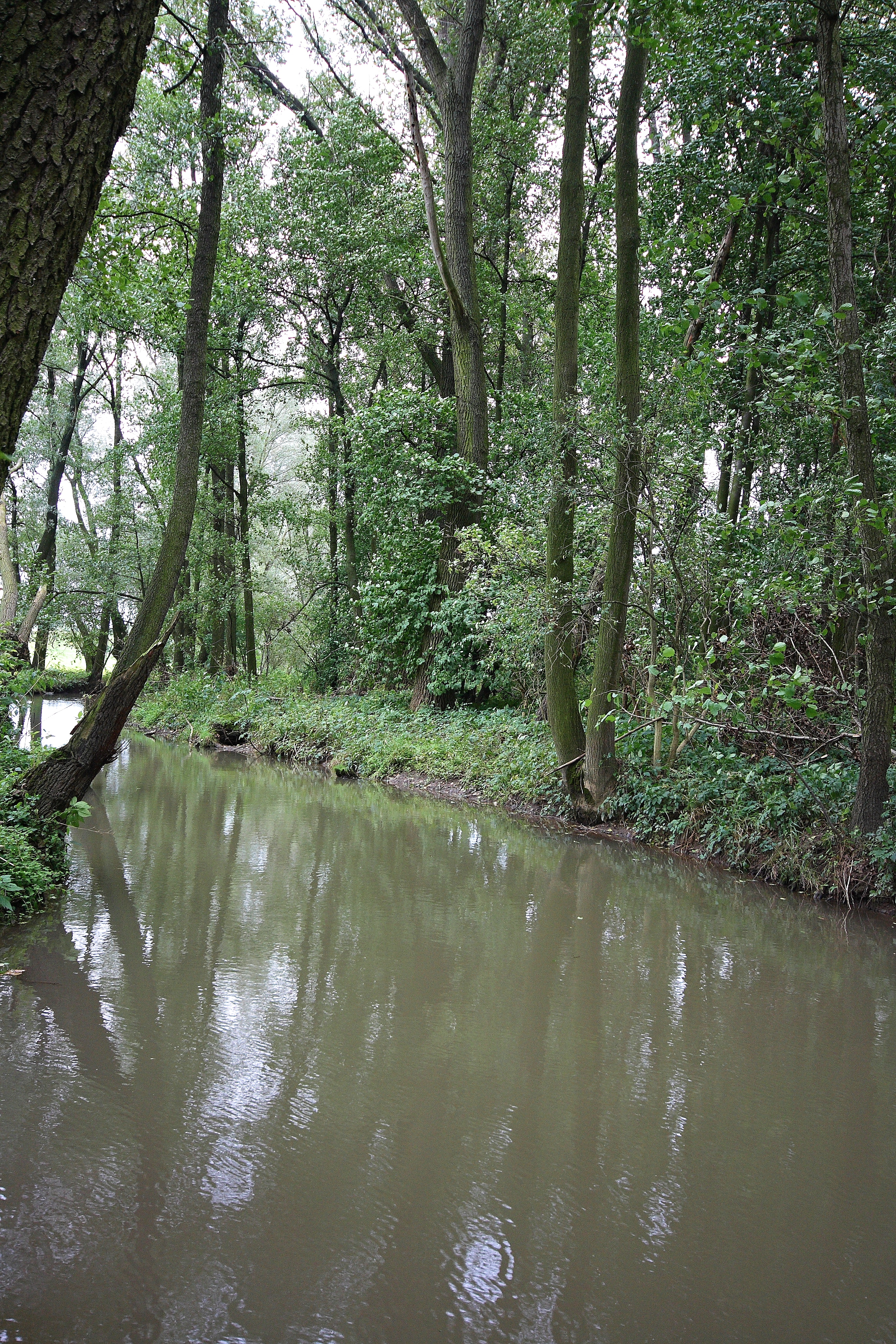 This photograph was taken with a DSLR from WMCZ's Camera grant.